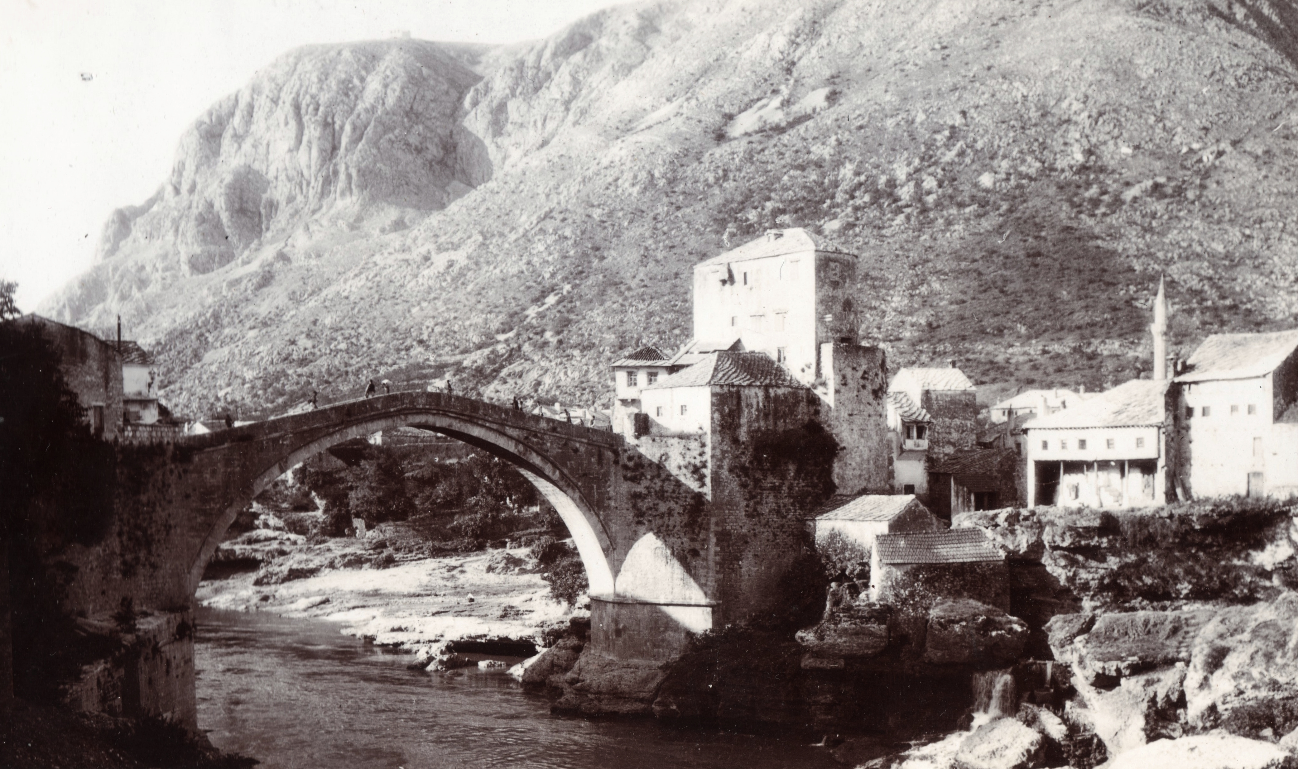 Öreg híd (Stari most) a Neretva folyón. Location: Bosnia and Herzegovina Tags: bridge, picture, hillside, shore, shore, water surface Title: Öreg híd (Stari most) a Neretva folyón.